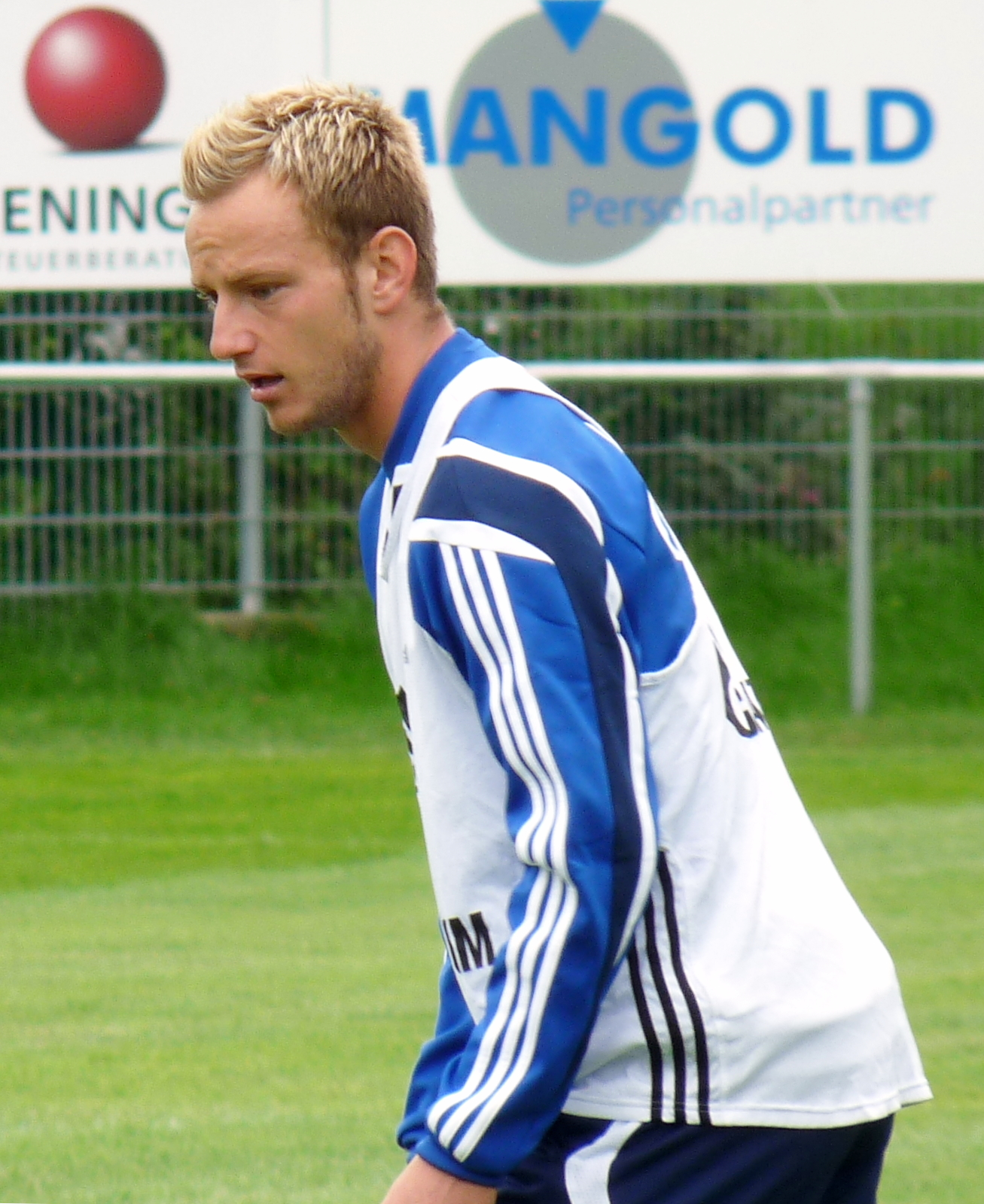 Ivan Rakitić während einer Trainingseinheit